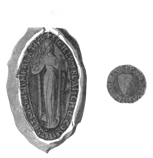 Reproducción del sello de Blanca de Navarra (1177-1229). Anverso i Reverso